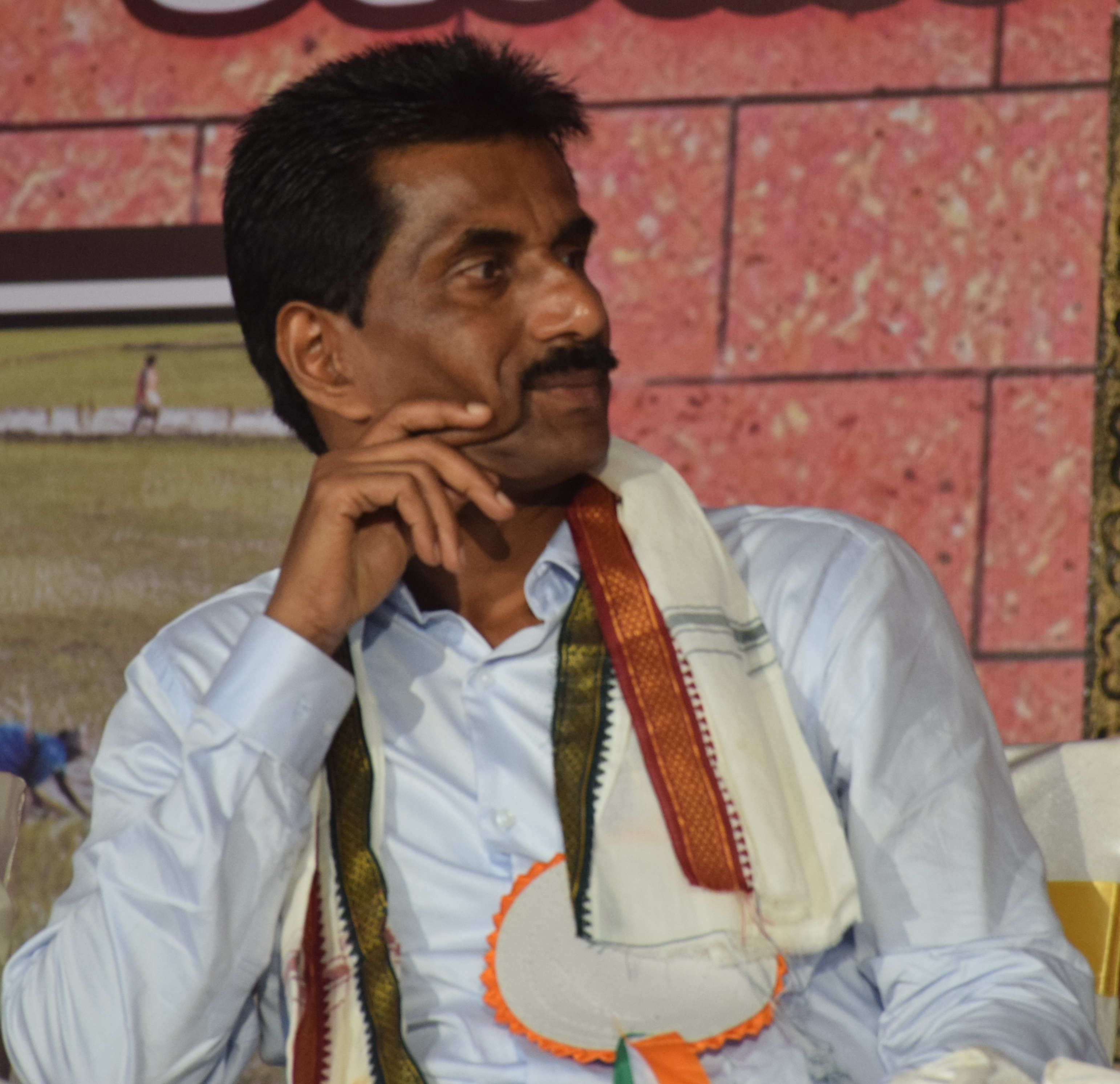 ತುಳು: ಕನ್ನಡೊಟ್ ಬರೆಪ್ಪಿನಾರ್